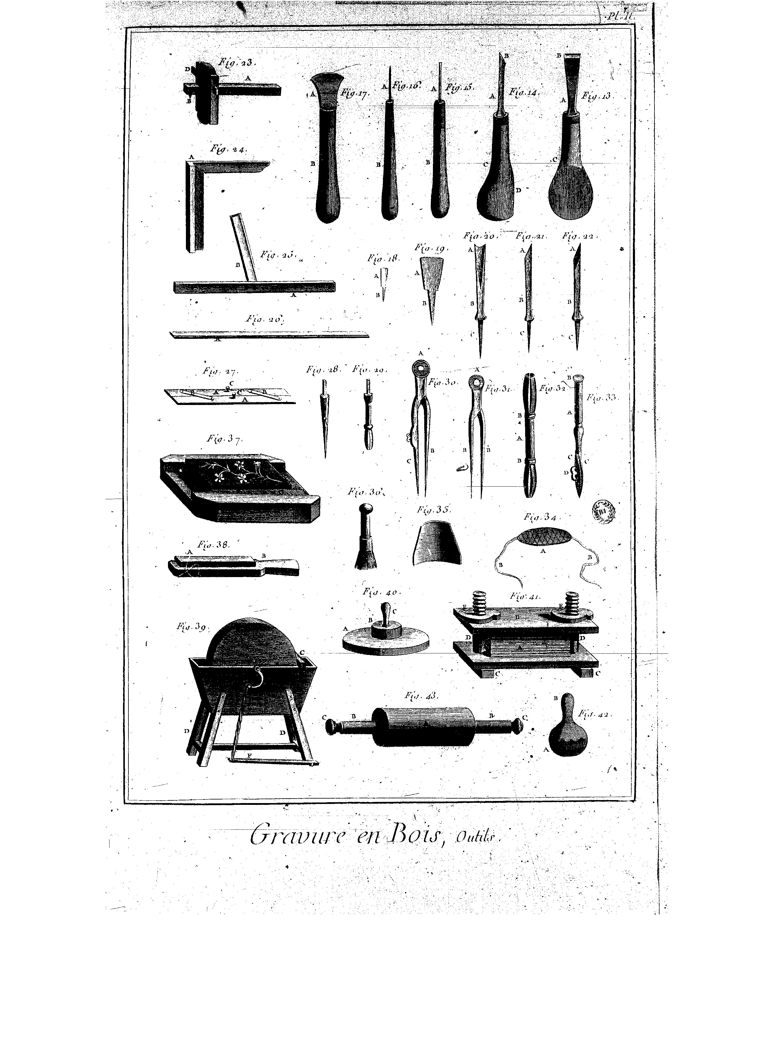 Planches de l'Encyclopédie de Diderot et d'Alembert, volume 4